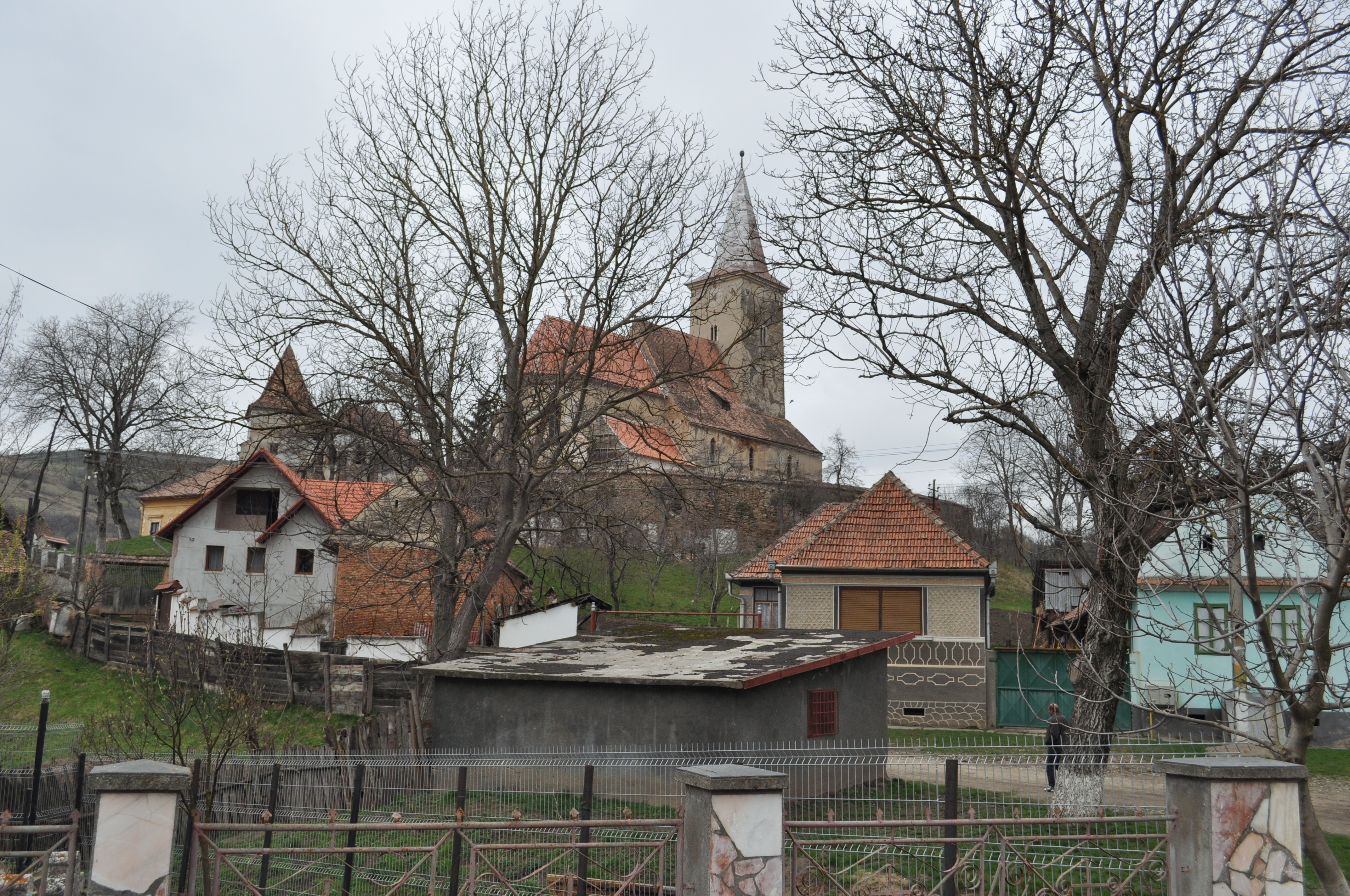 Ansamblul bisericii evanghelice fortificate, sat CURCIU; comuna DÂRLOS